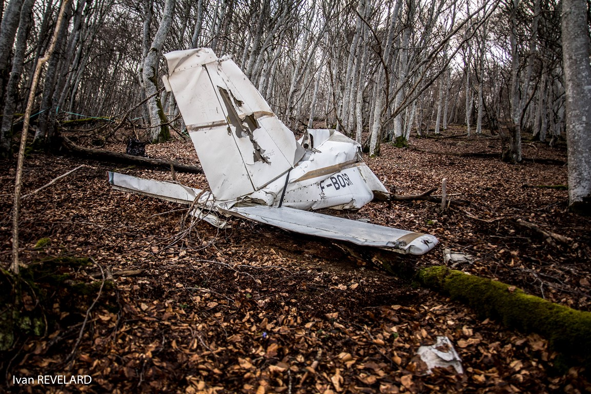 Carcasse d'un avion de la marque Beechcraft